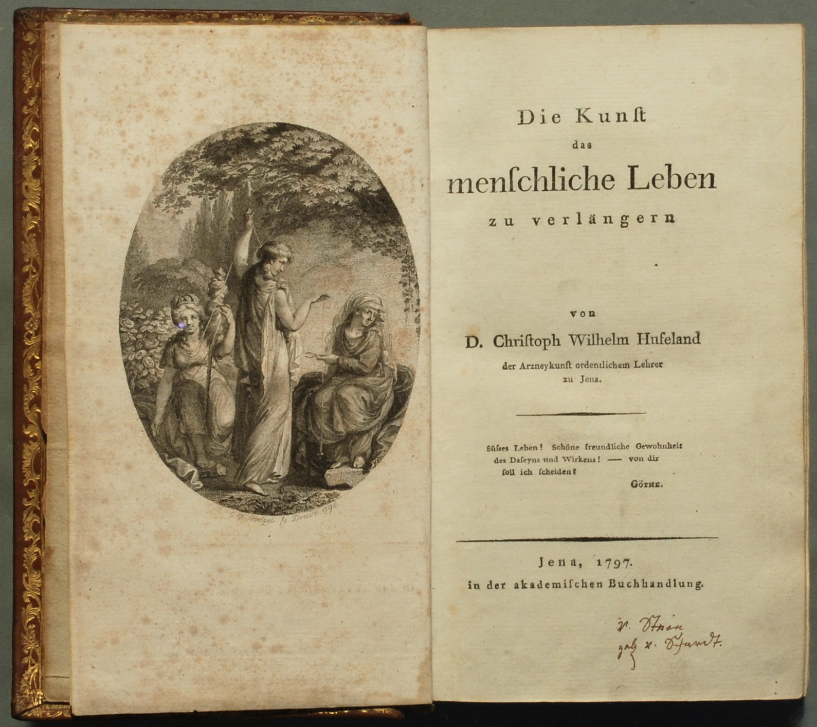 Hufeland, Christoph Wilhelm: Die Kunst das menschliche Leben zu verlängern. Jena: Akademische Verlagsbuchhandlung 1797, Erstdruck. XXIV + 696 Seiten. Provenienz: Freifrau Charlotte von Stein, geb. von Schardt (1742 - 1827, Namenszug auf dem Titel rechts unten). - Gestochenes Frontispiz von Christian Friedrich Stälzel (1751 - 1816, THIEME-BECKER Bd. 32, S. 89). Dargestellt sind die Moiren (Parzen) Klotho, die den Lebensfaden spinnt, Lachesis, die ihn führt und Atropos, die ihn abschneidet. - Spiegel gerahmt mit goldgeprägten Girlanden.